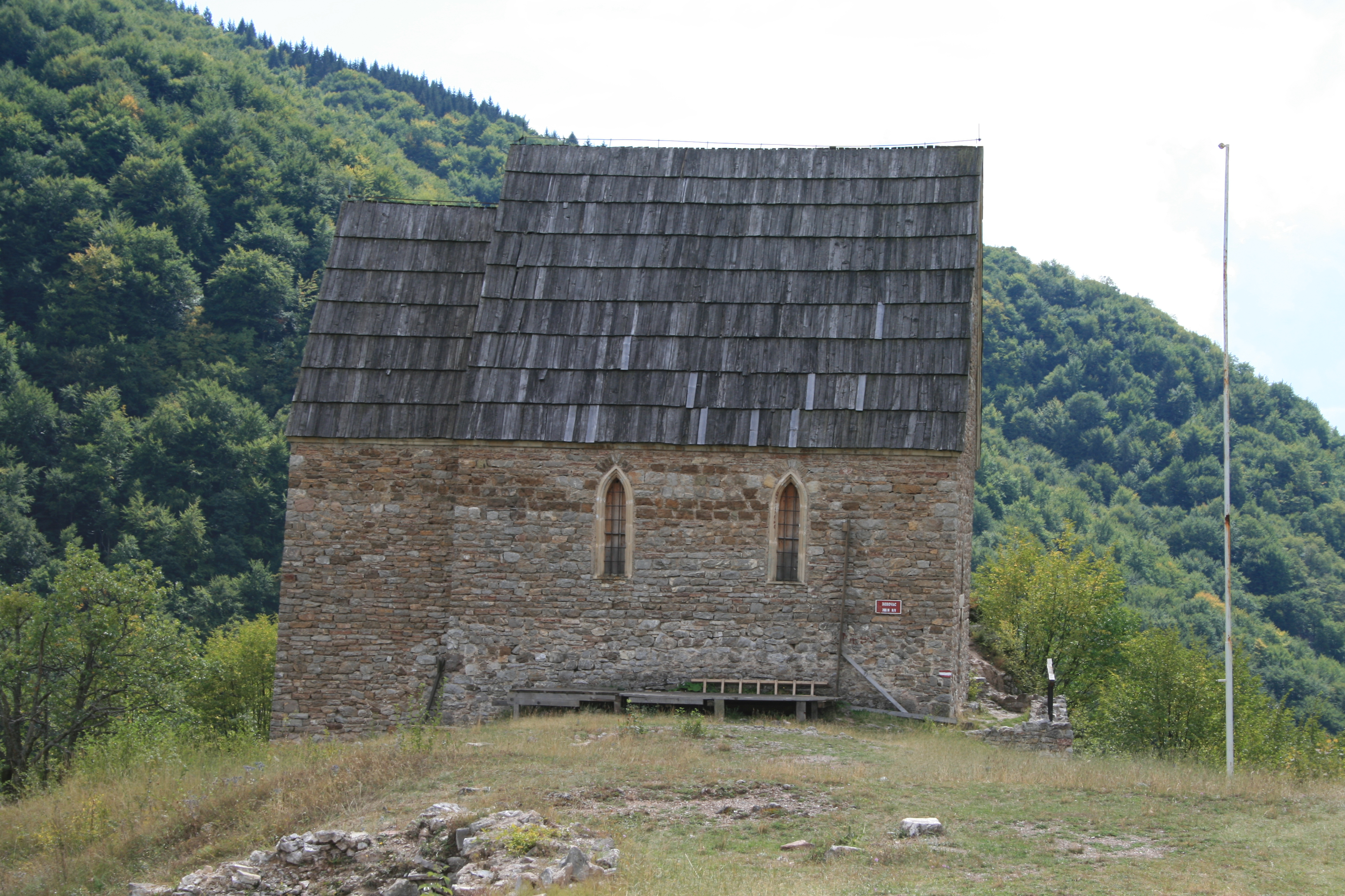 Bobovac, Bosnien und Herzegowina